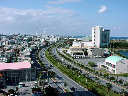 National Route 58, Ginowan, Okinawa.